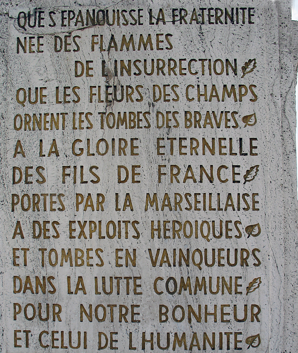 Text na pamätníku francúzskych partizánov na Strečne